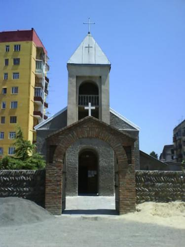 ხაშურის წმინდა ნიკოლოზის ეკლესია